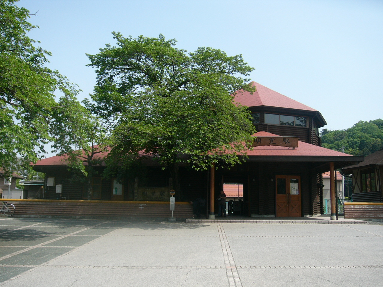 Myokaku Station